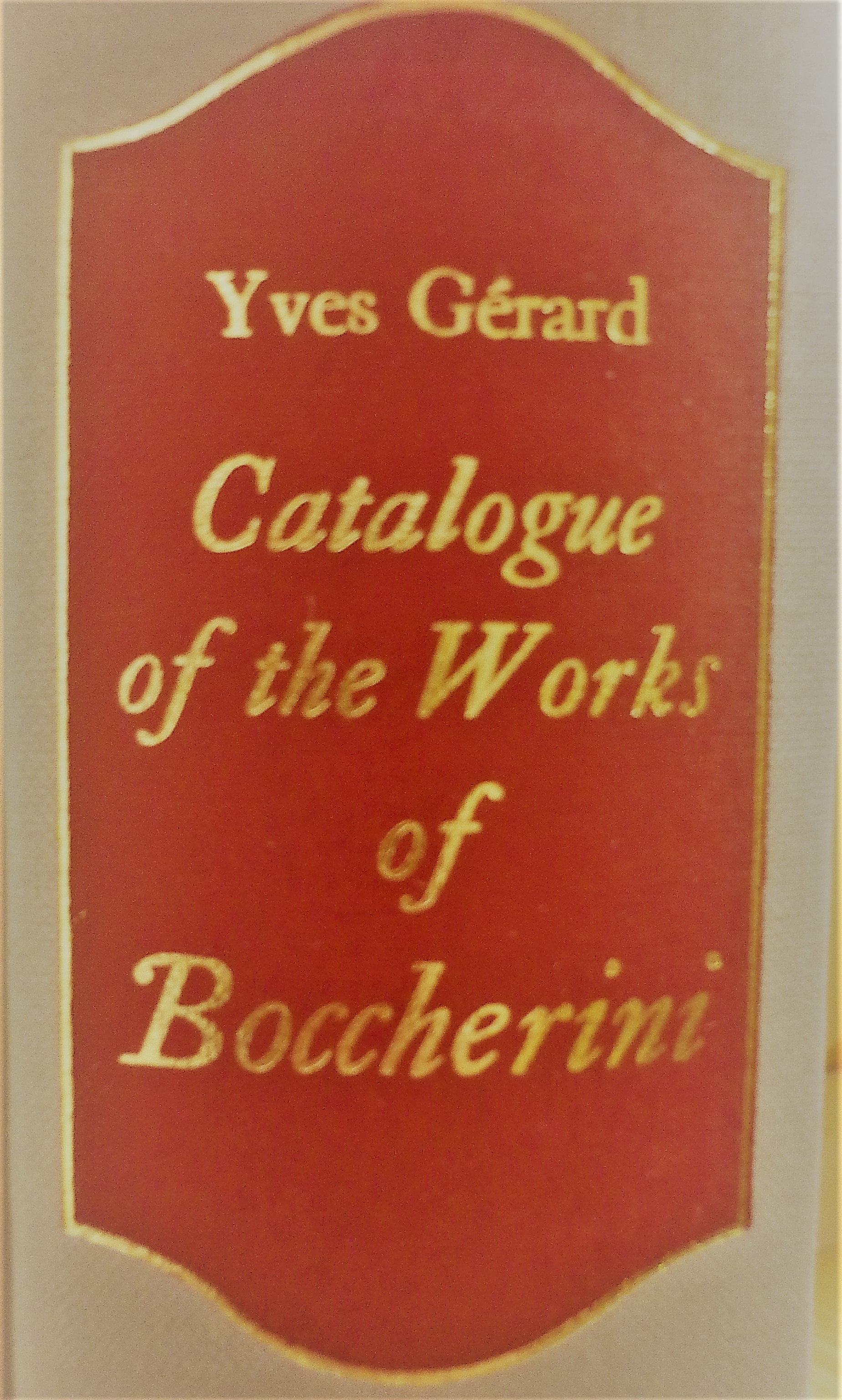 Thematic, Bibliographical and Critical Catalogue of the Works of Luigi Boccherini by Yves Gérard, Oxford, 1969.